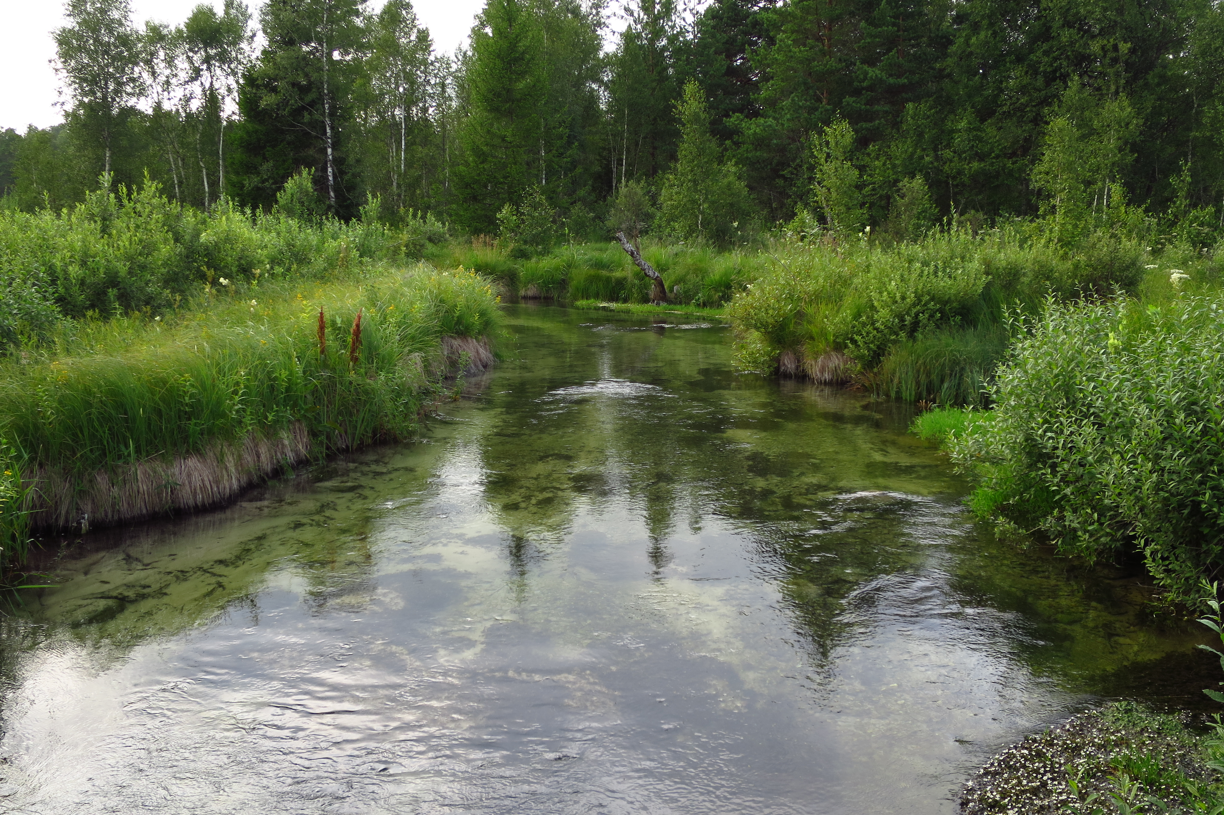 Preedi jõgi Varangu LKA-l